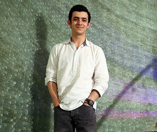 علی شادمان در مراسم تجلیل خبرگزاری تسنیم از عوامل فیلم سینمایی «ویلایی‌ها» در شامگاه روز ۲۴ تیرماه ۱۳۹۶در تالار ایوان شمس